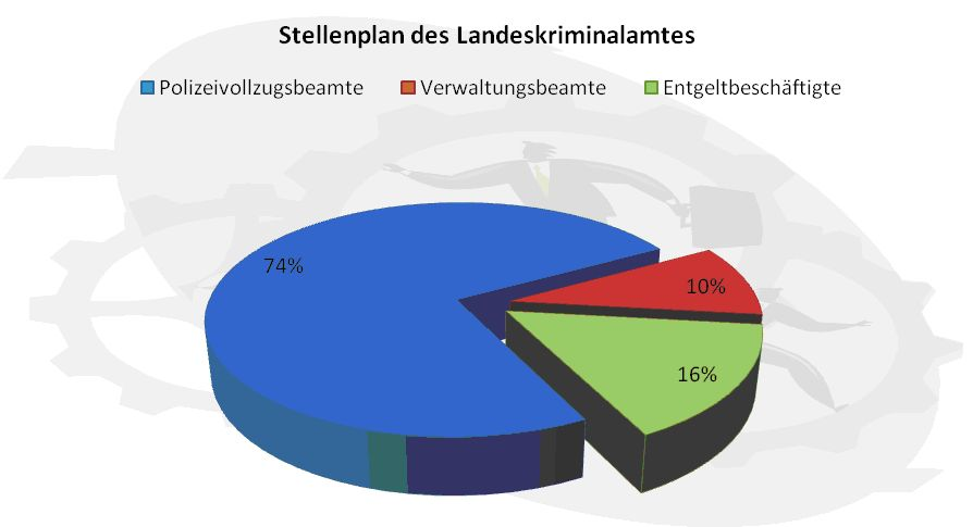 Grafik, die die Verteilung der Stellen des Landeskriminalamtes Thüringen in Polizeivollzugsbeamte, Verwaltungsbeamte und Entgeltbeschäftigte anzeigt